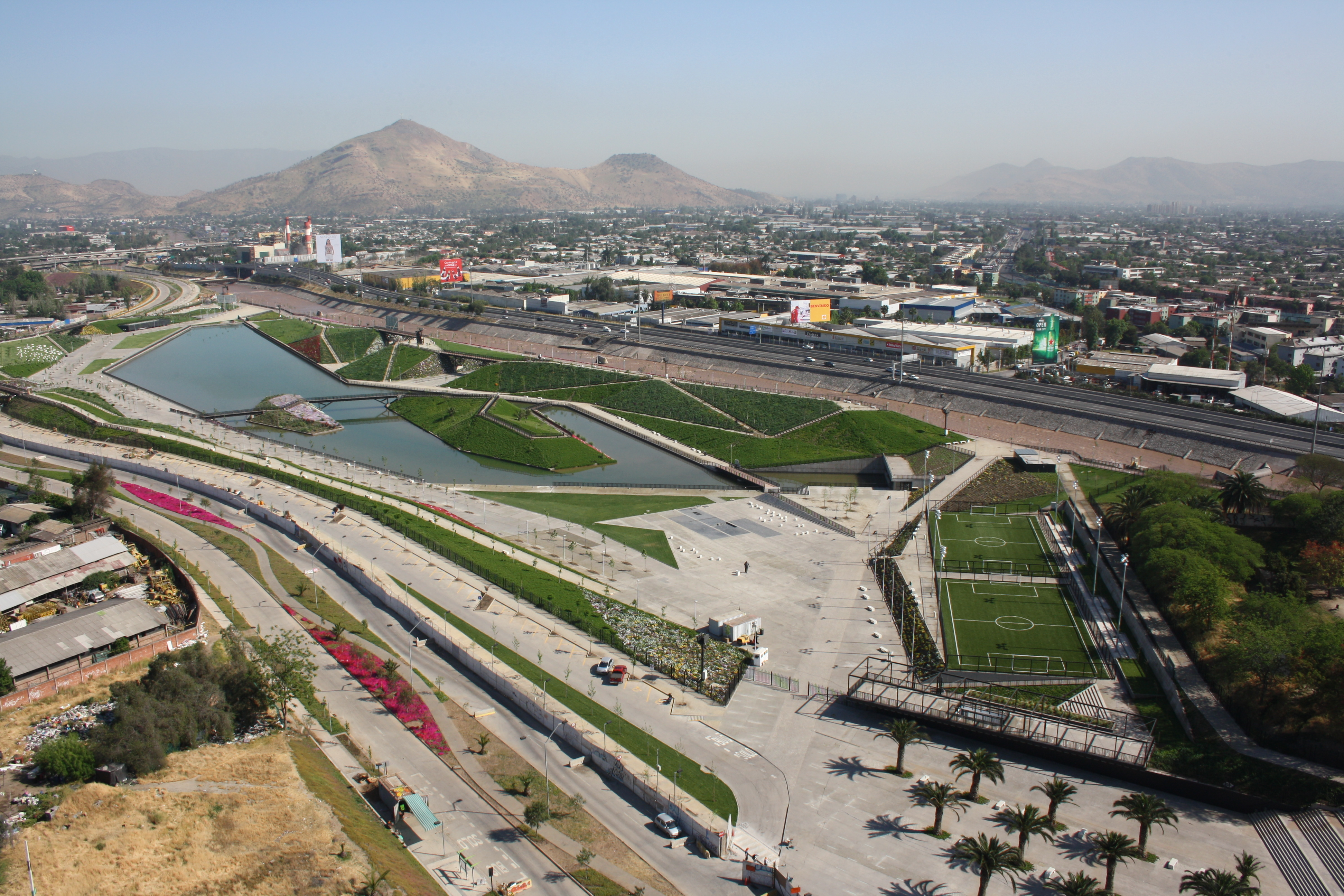 Parque Renato Poblete visto desde altura